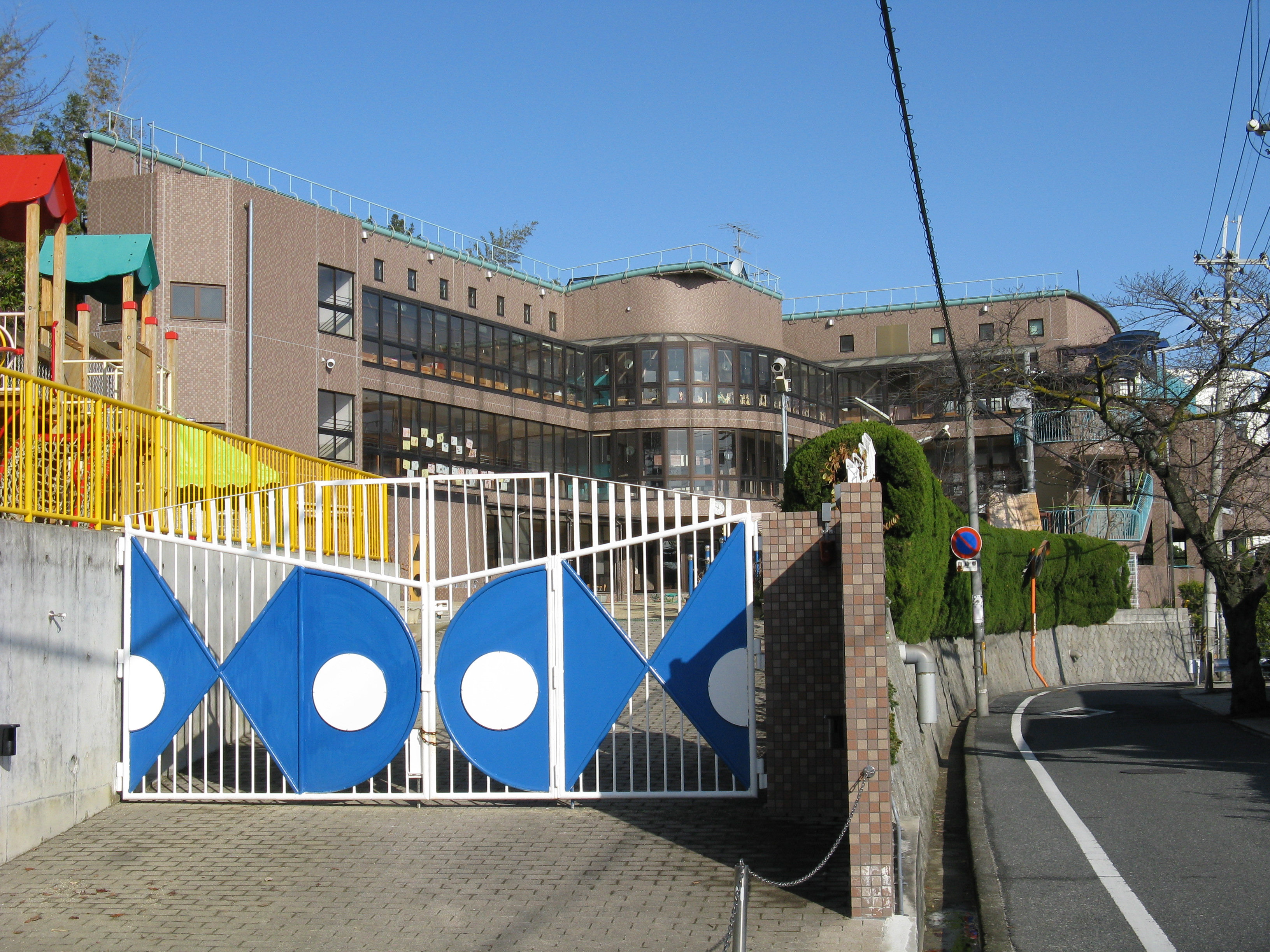 大阪千代田短期大学附属幼稚園